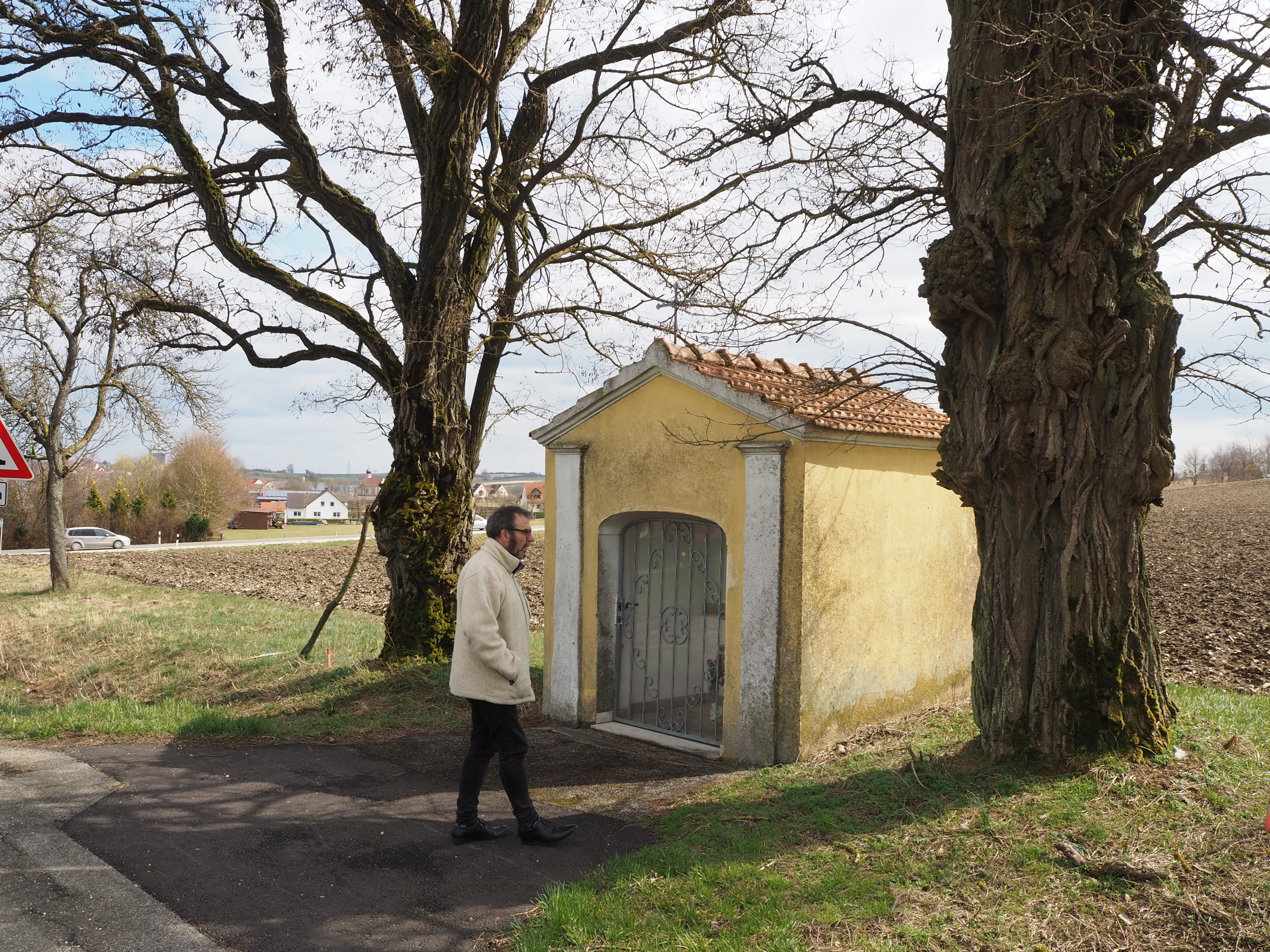 Fünfstetten, Feldkapelle Lenzenberg BLfD D-7-79-148-15